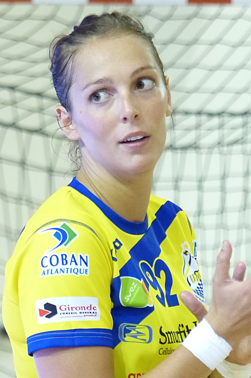 Audrey Deroin, ailière droite au club Union Mios Biganos-Bègles Handball. Le 14 septembre 2014, lors du match Issy Paris Hand / Mios Biganos Bègles au stade Robert Charpentier à Issy-les-Moulineaux.